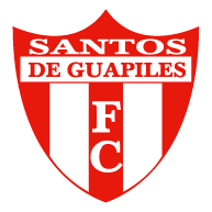 Primer escudo del Santos de Guápiles